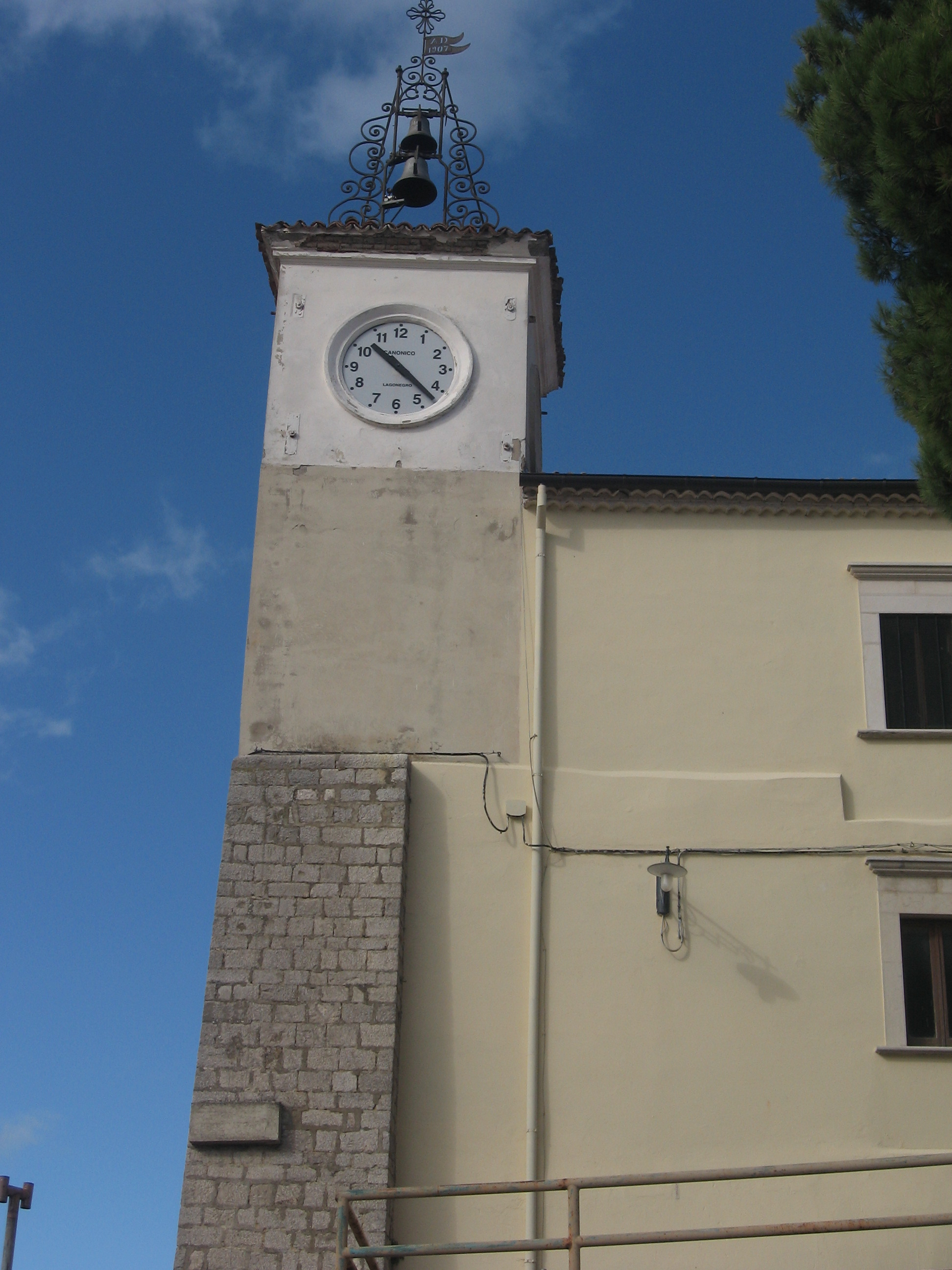 Torre dell'orologio